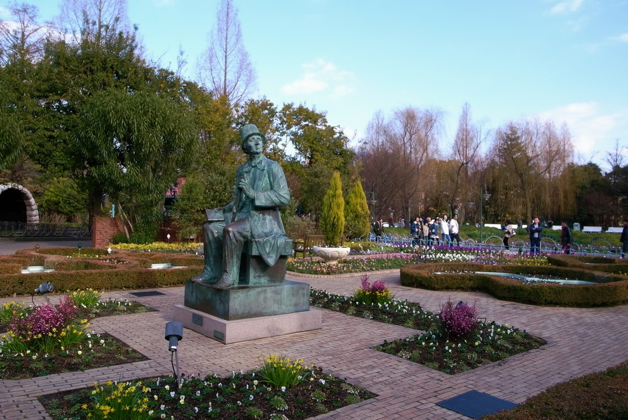 Hans Christian Andersen's statue and paper-cutting garden in Kurashiki Tivoli Park, Kurashiki, Okayama, Japan.